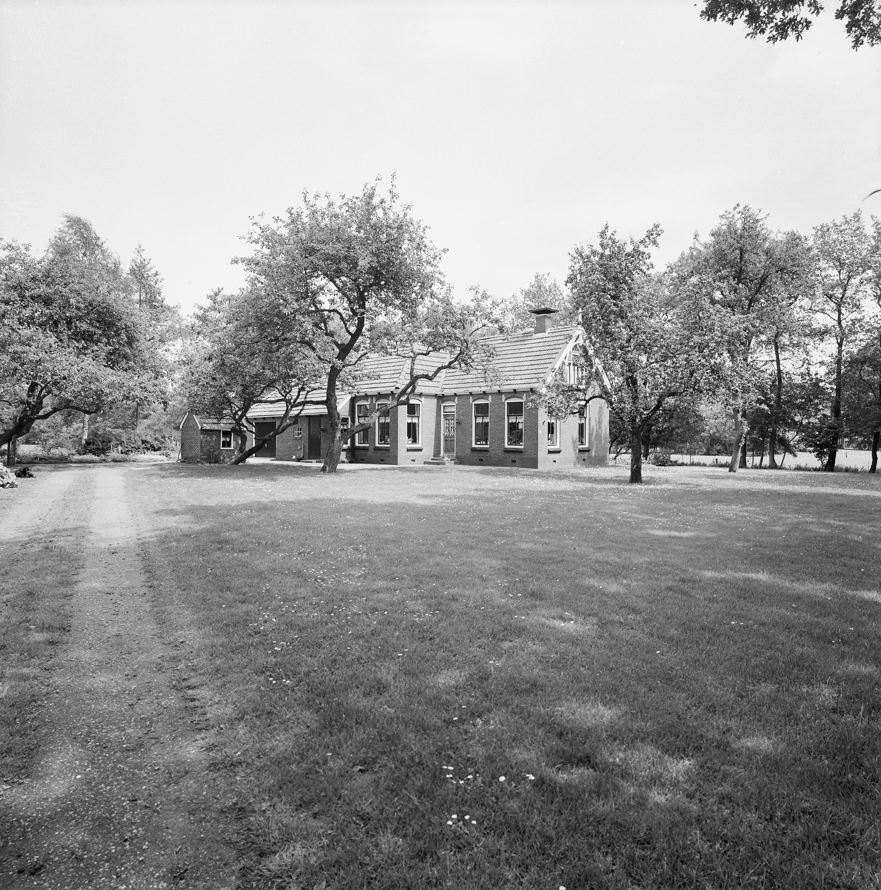 Boerderij Nooitgedagt: Overzicht voorgevel en rechter zijgevel (opmerking: Gefotografeerd voor Monumenten In Nederland Groningen)